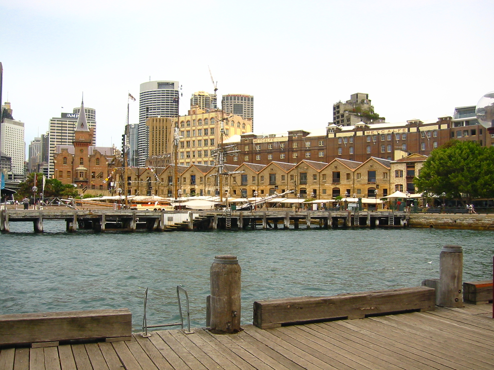 Blick auf The Rocks von einem Dock